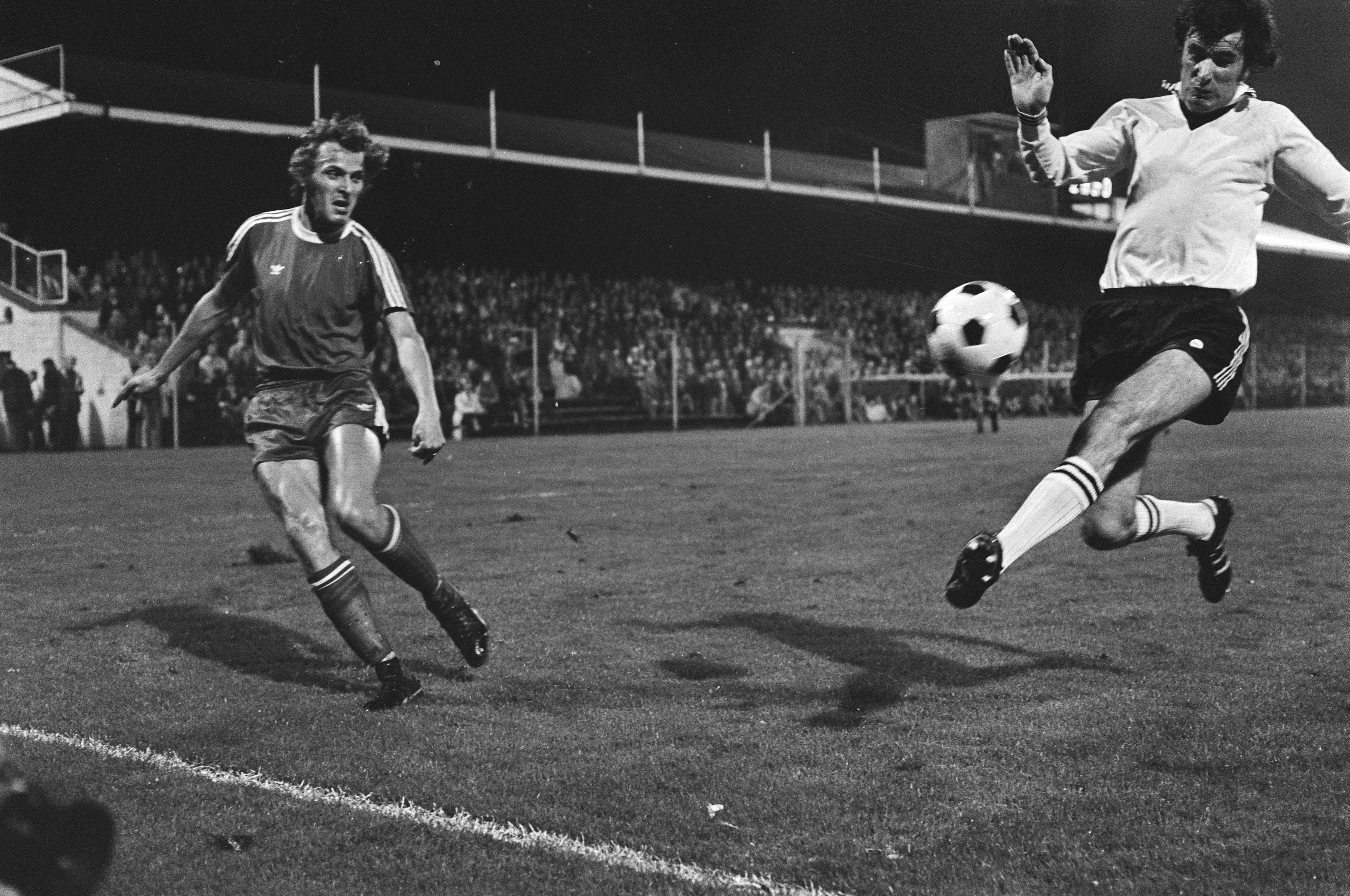 Collectie / Archief : Fotocollectie Anefo Reportage / Serie : [ onbekend ] Beschrijving : PSV tegen Dundalk 7-0; Rene van der Kerkhoff scoort langs Mc Laughlin Datum : 29 september 1976 Trefwoorden : sport, voetbal Persoonsnaam : Kerkhof, René van de Fotograaf : Peters, Hans / Anefo Auteursrechthebbende : Nationaal Archief Materiaalsoort : Negatief (zwart/wit) Nummer archiefinventaris : bekijk toegang 2.24.01.05 Bestanddeelnummer : 928-8081